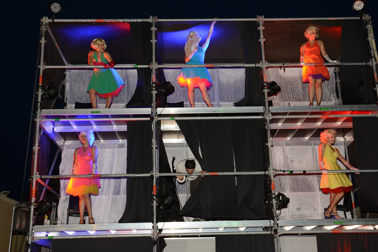 מיצג מרלין מונרו בפסטיבל בציר חדש ביבנה, 2015